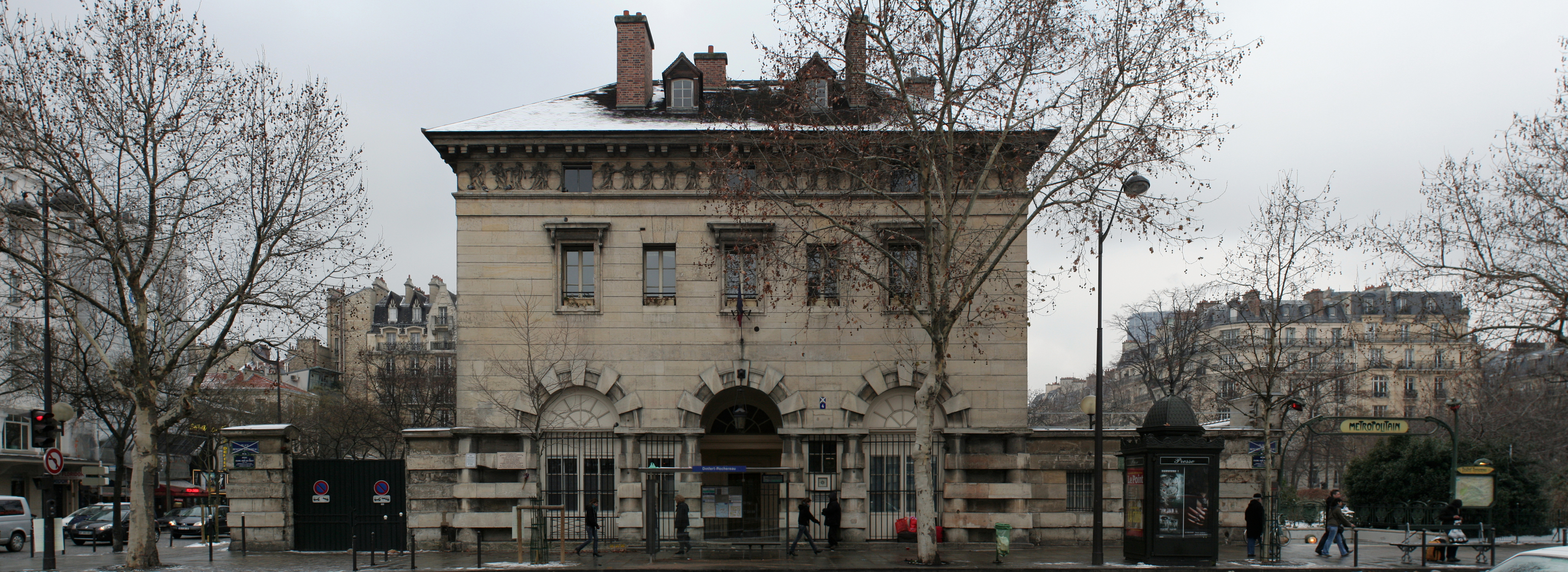 Pavillon ouest de la Barrière d'Enfer, place Denfert-Rochereau, Paris This image was created with Hugin.